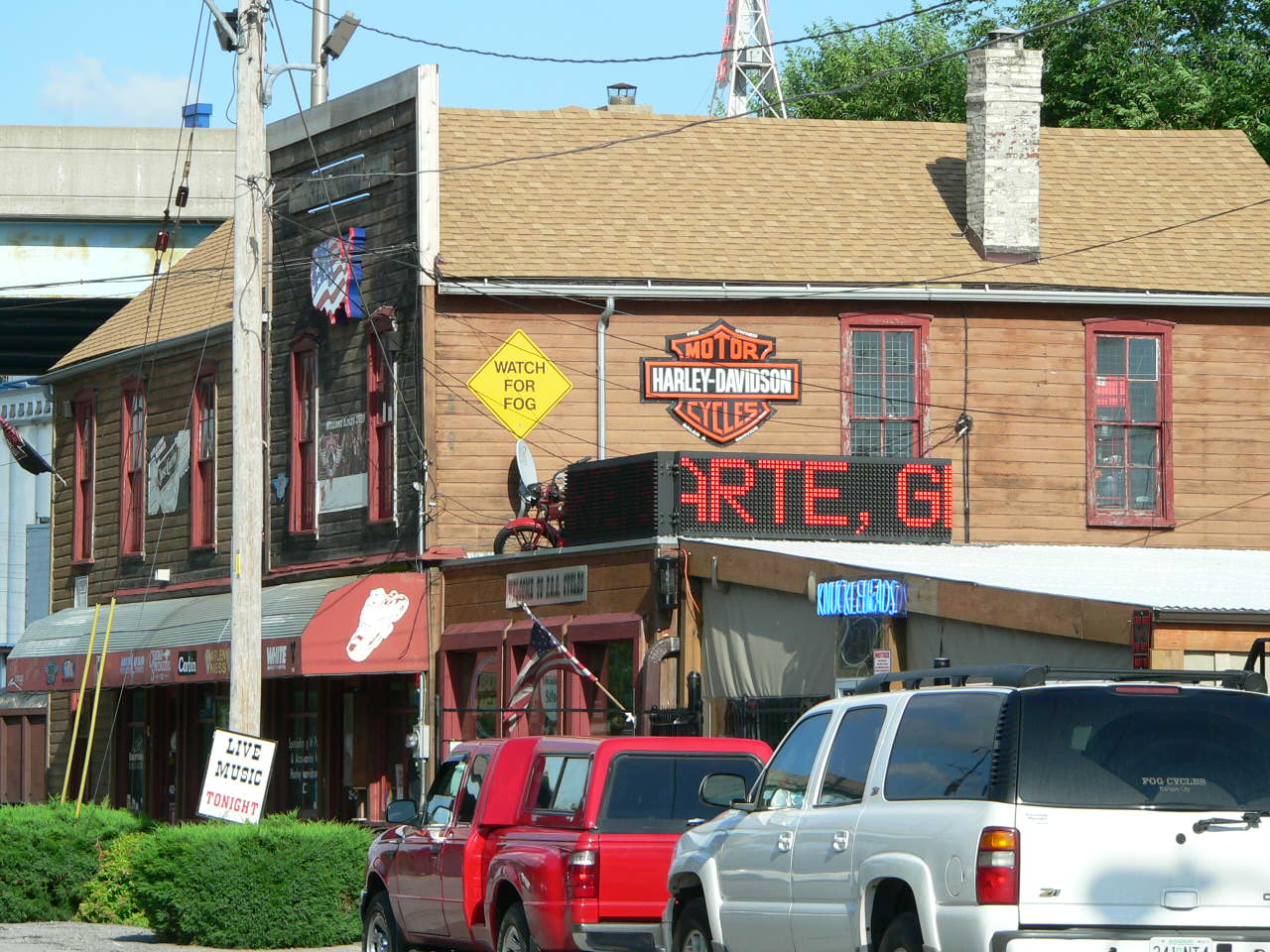 Knuckleheads Saloon exterior